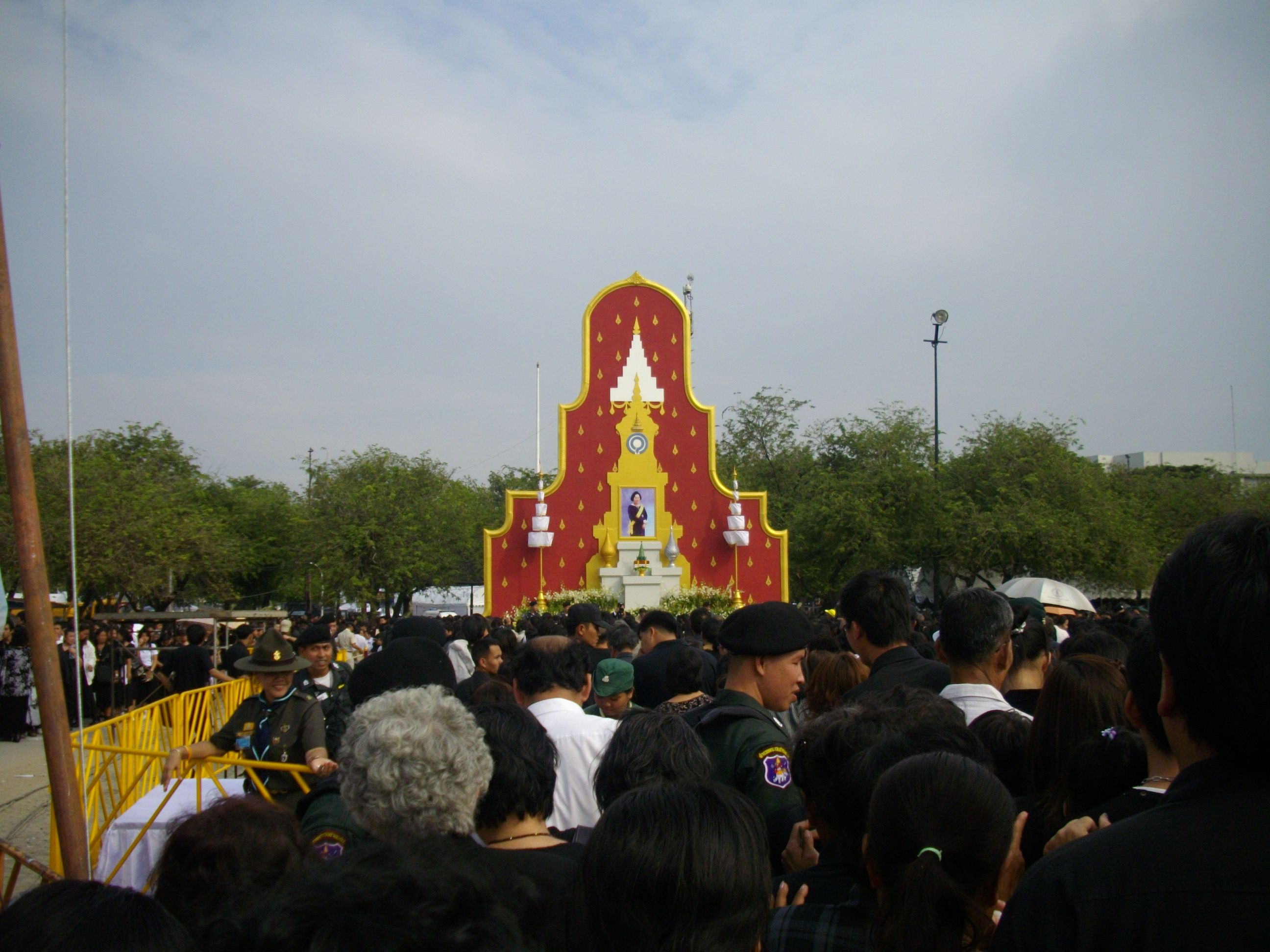 ประชาชนชาวไทยร่วมวางดอกไม้จันทน์ถวายพระเพลงพระศพสมเด็จพระเจ้าพี่นางเธอ เจ้าฟ้ากัลยาณิวัฒนา กรมหลวงนราธิวาสราชนครินทร์ ที่ซุ้มวางตอกไม้จันทน์ในมณฑลพิธีท้องสนามหลวง